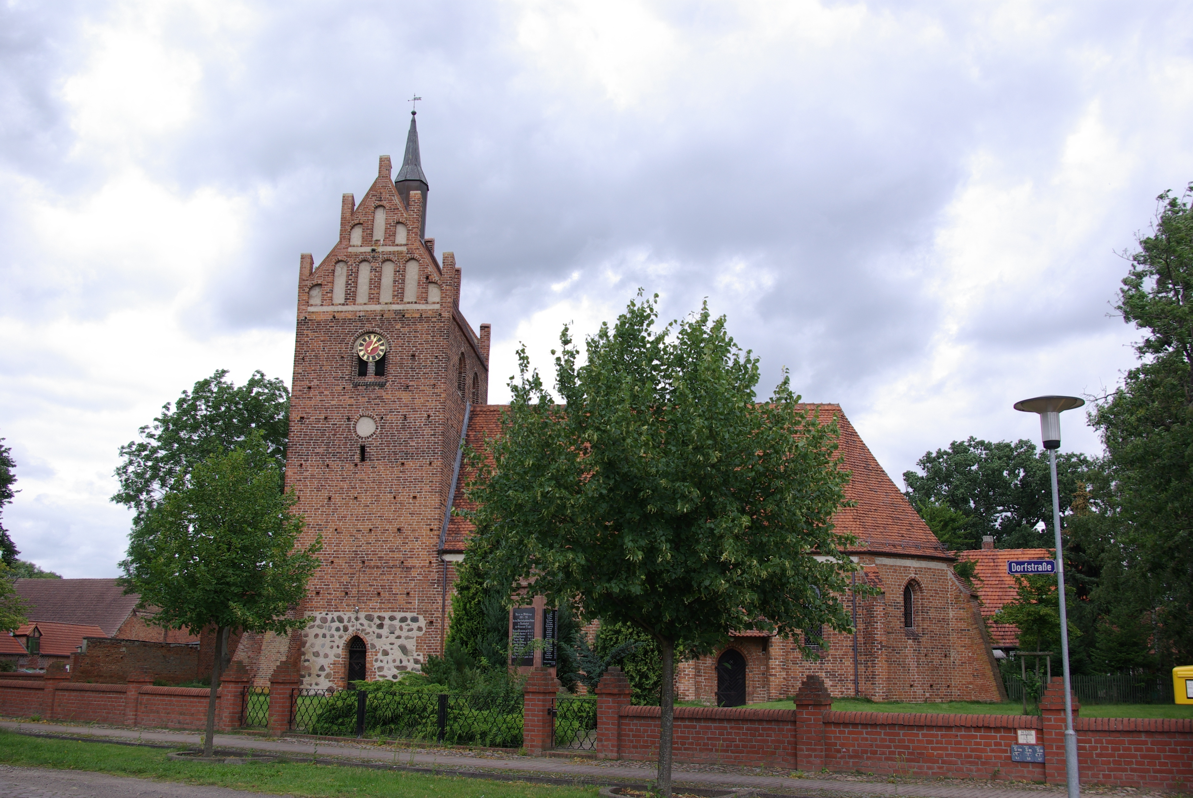 Legde/Quitzöbel in Brandenburg. Die Kirche im Ortsteil Legde steht unter Denkmalschutz.